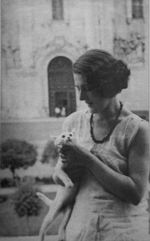 Мария Ильф.